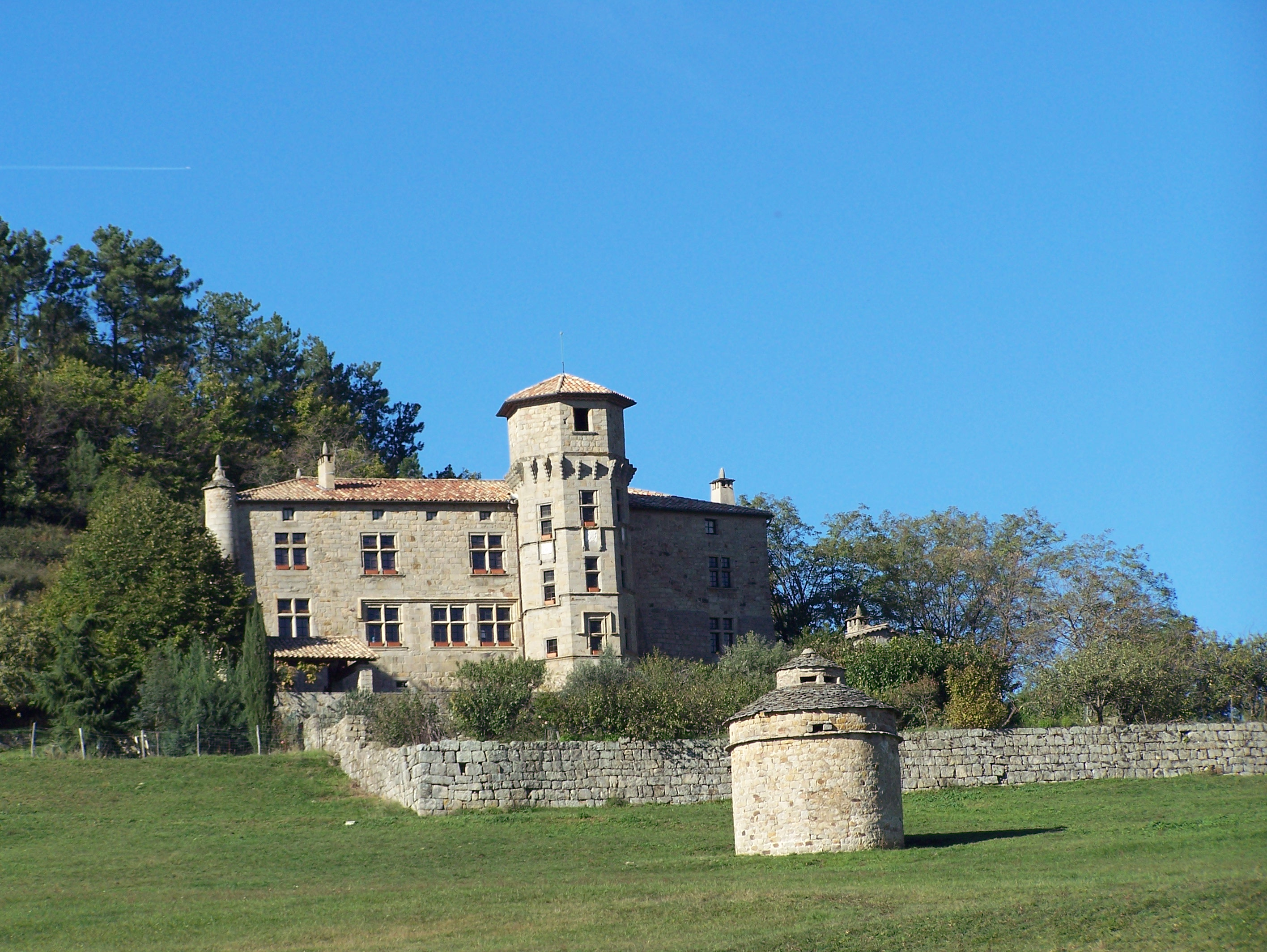 Joyeuse dans le département français de l'Ardèche : Château de Versas.